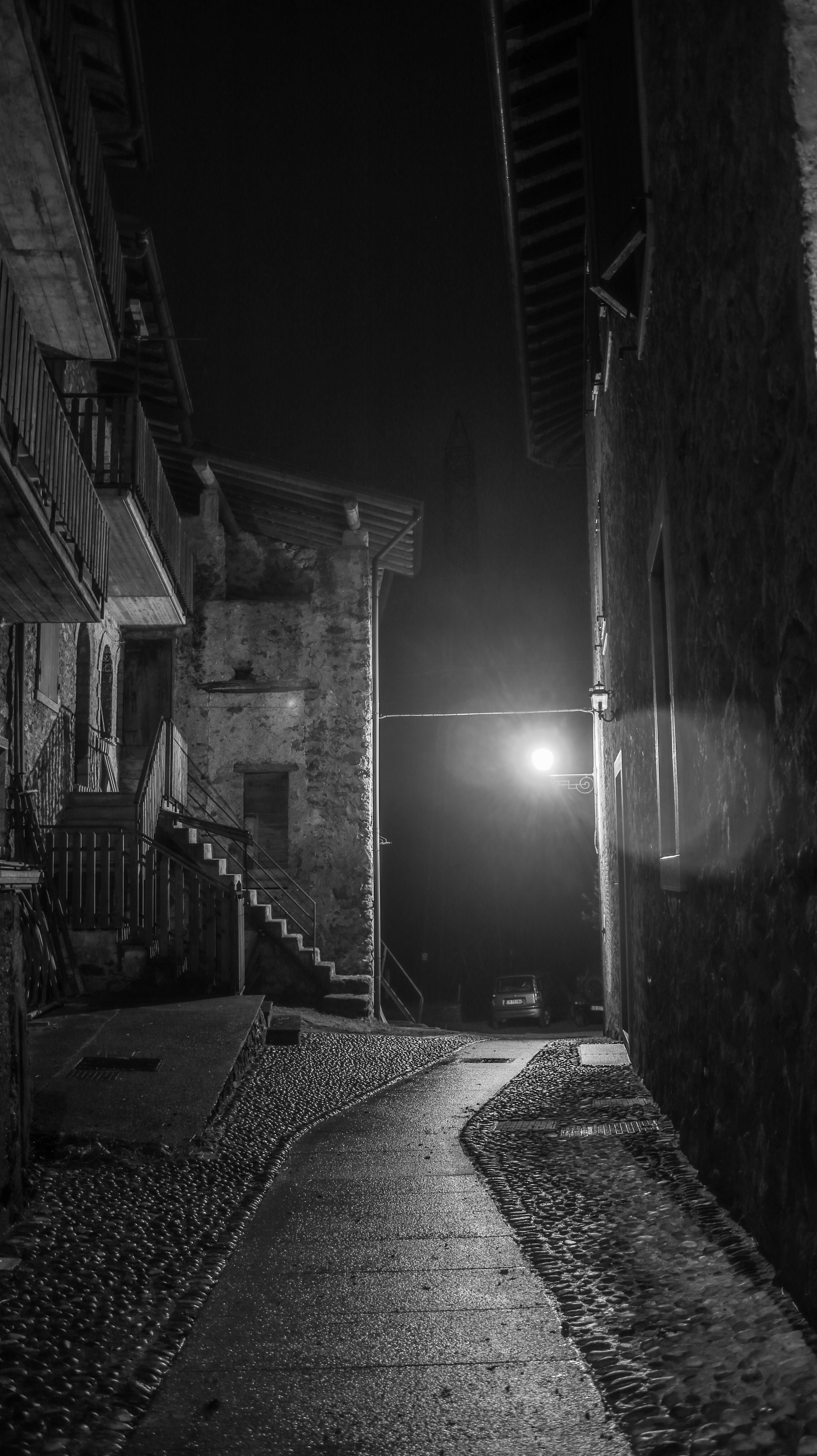 Una delle frazioni di San Pellegrino Terme, situata sulla sponda destra del fiume Brembo.